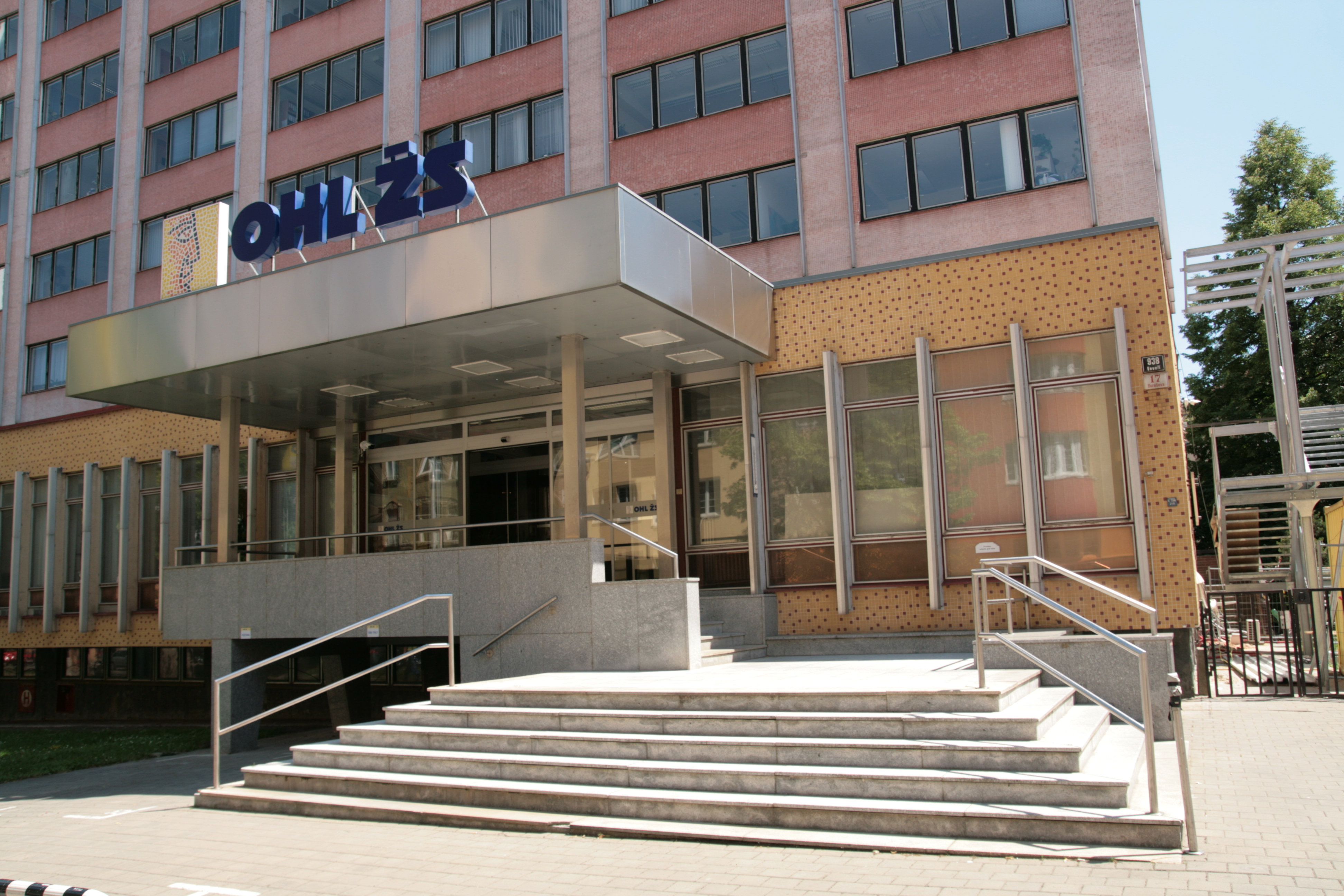 Sídlo stavební společnosti OHL ŽS (dříve Železniční stavitelství Brno) v Burešově ulici č. 938/17, Brno.